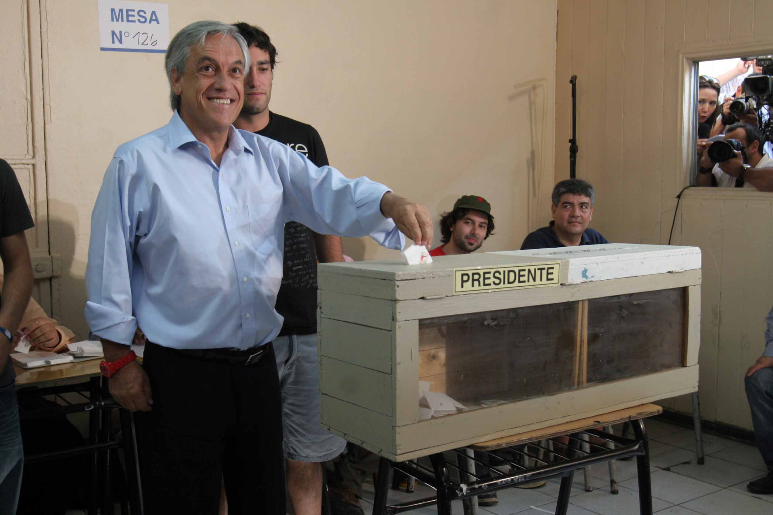 Sebastian Piñera en el momento del voto en la segunda vuelta presidencial. 17 de enero de 2010.